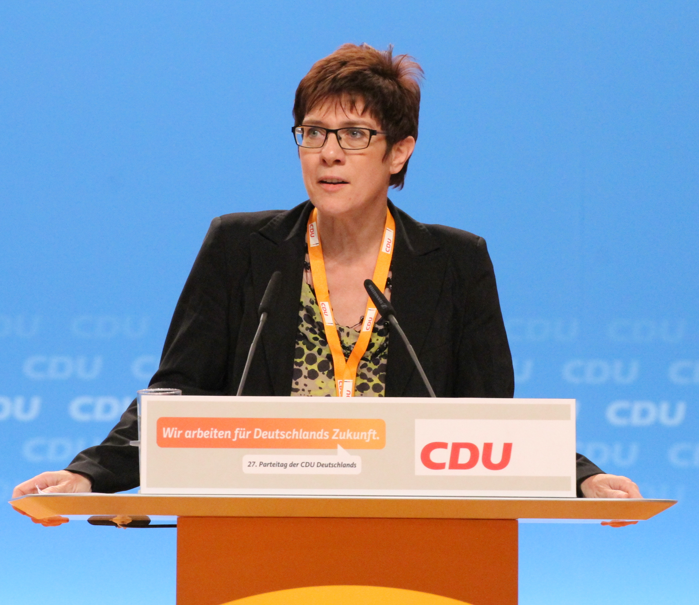 Annegret Kramp-Karrenbauer auf dem CDU Bundesparteitag Dezember 2014 in Köln